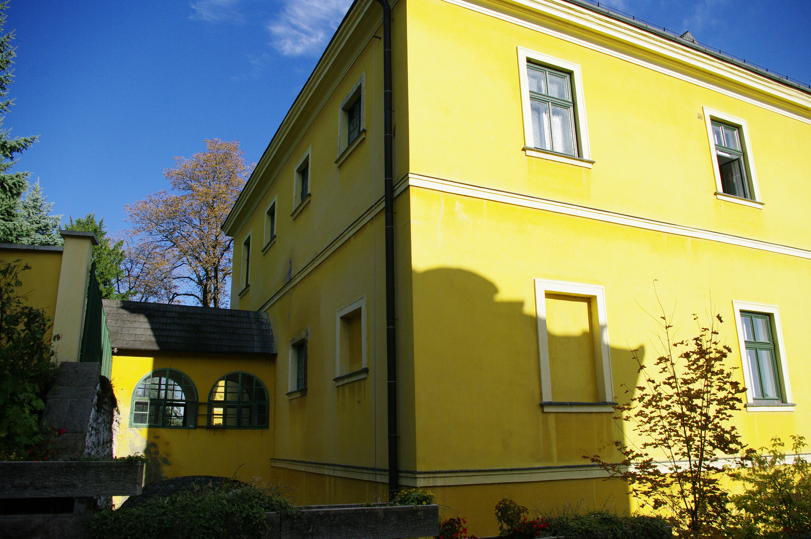 Papnevelde (Egri Érseki Hittudományi Főiskola) (Eger, Várpsfal u.) This is a photo of a monument in Hungary, Identifier: 5505